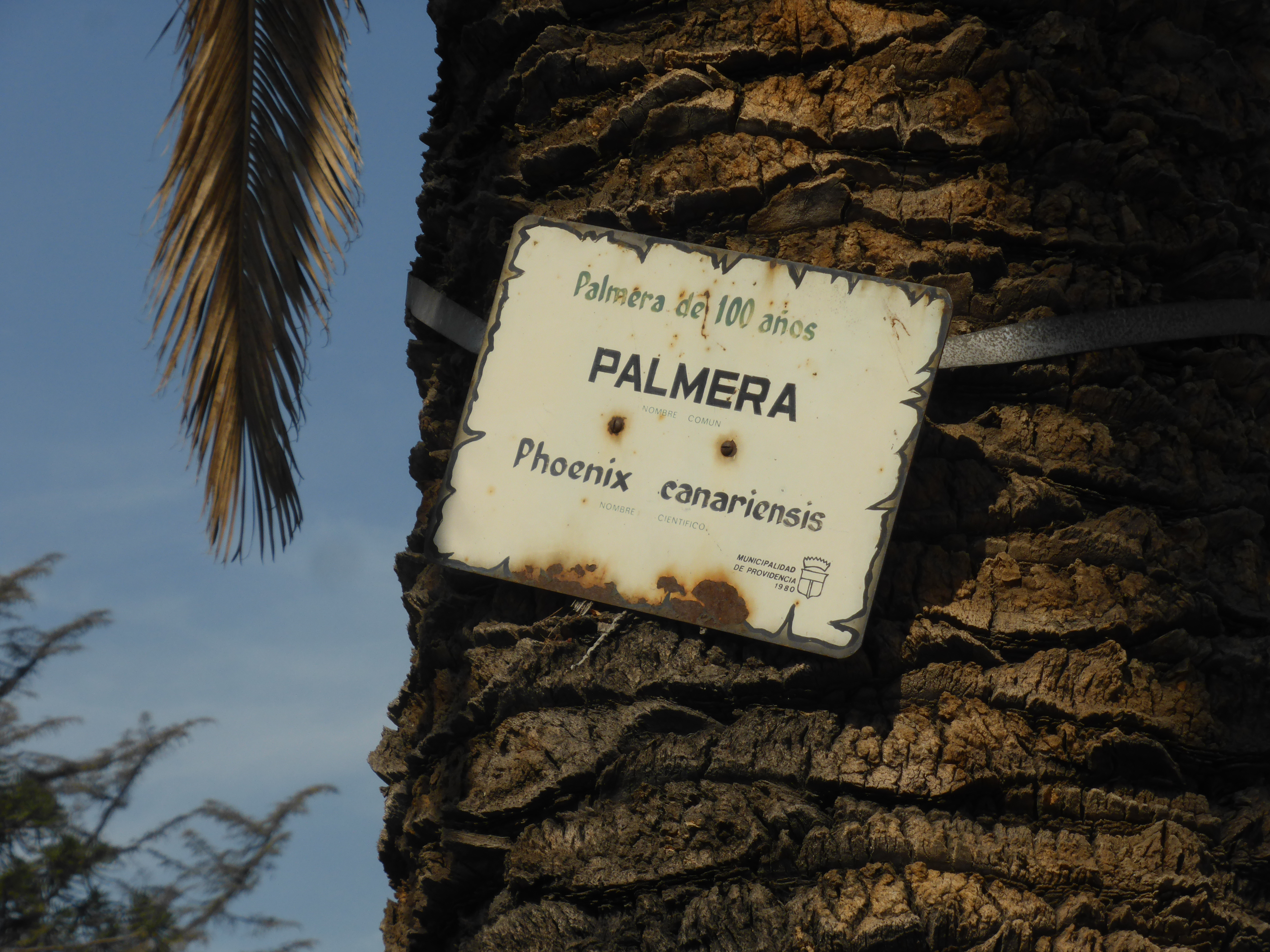 Cartel o rótulo en una palmera canaria, del parque o Plaza Pedro de Valdivia, en Providencia. Se puede leer: "Palmera de 100 años. PALMERA (Nombre común). Phoenix canariensis (Nombre científico). Municipalidad de Providencia, 1980".